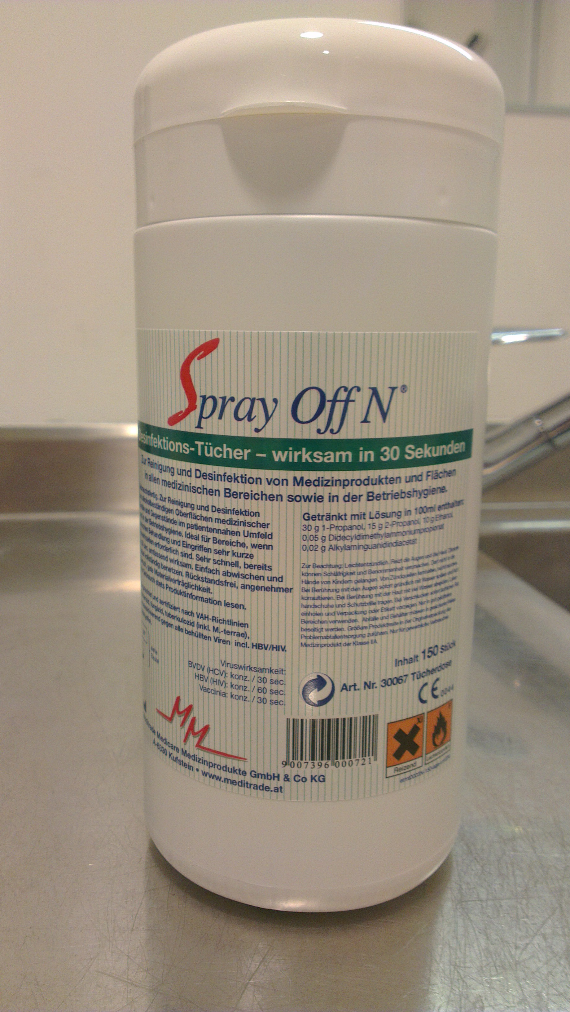 Na sliki so prikazane alkoholne krpice, lastna slika